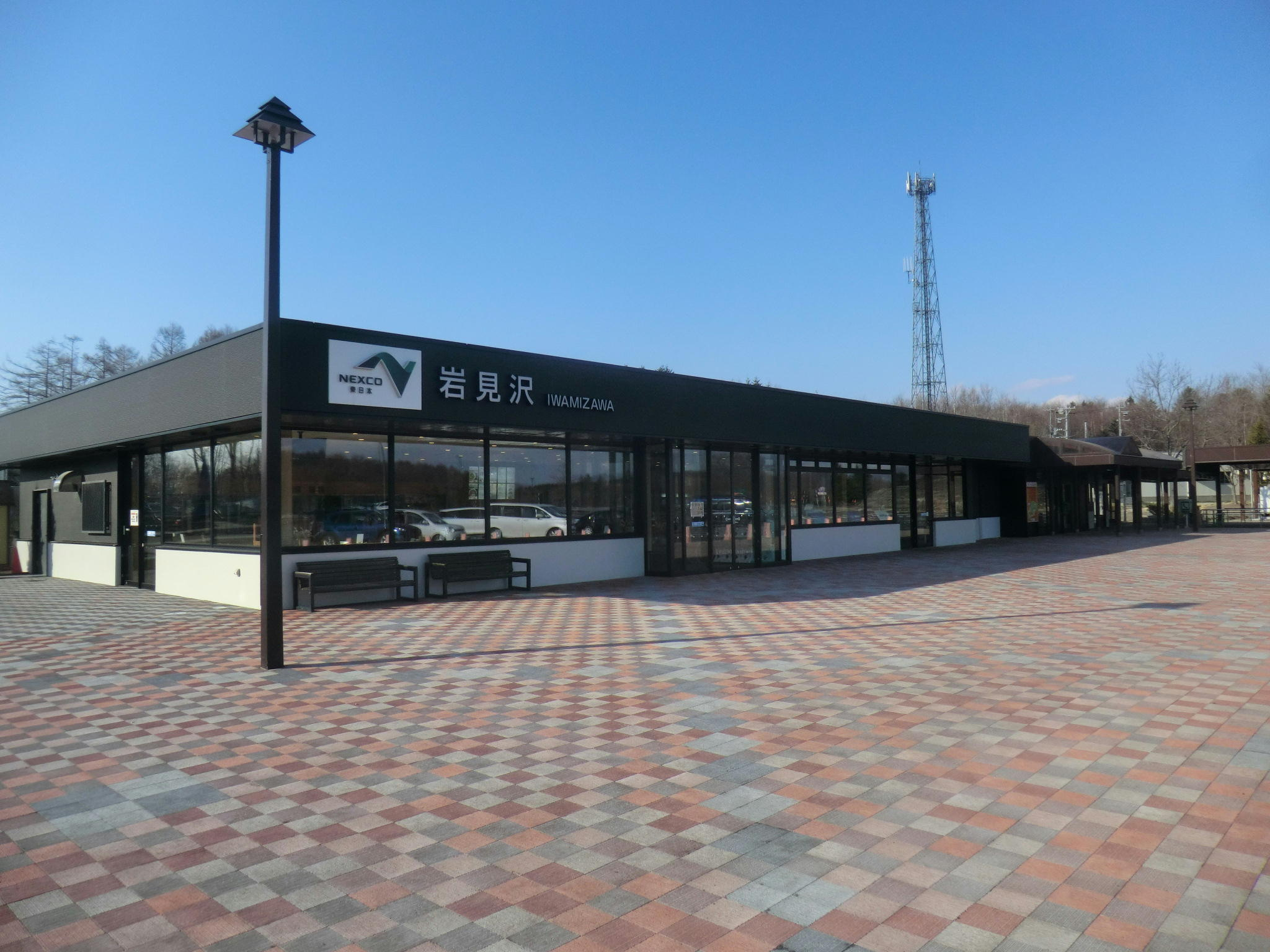 道央自動車道・岩見沢SA下り線の、2014年にリニューアルされた売店・レストラン棟です。